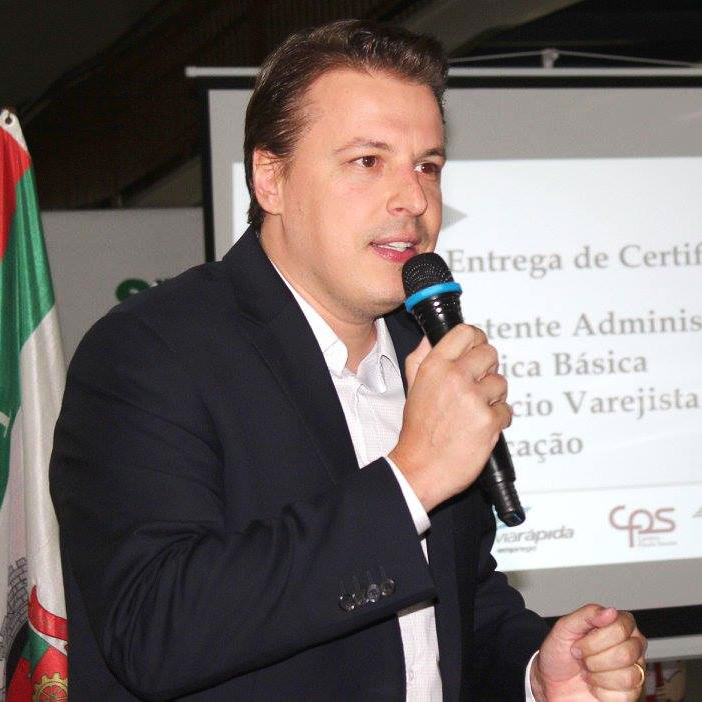 Igor Soares